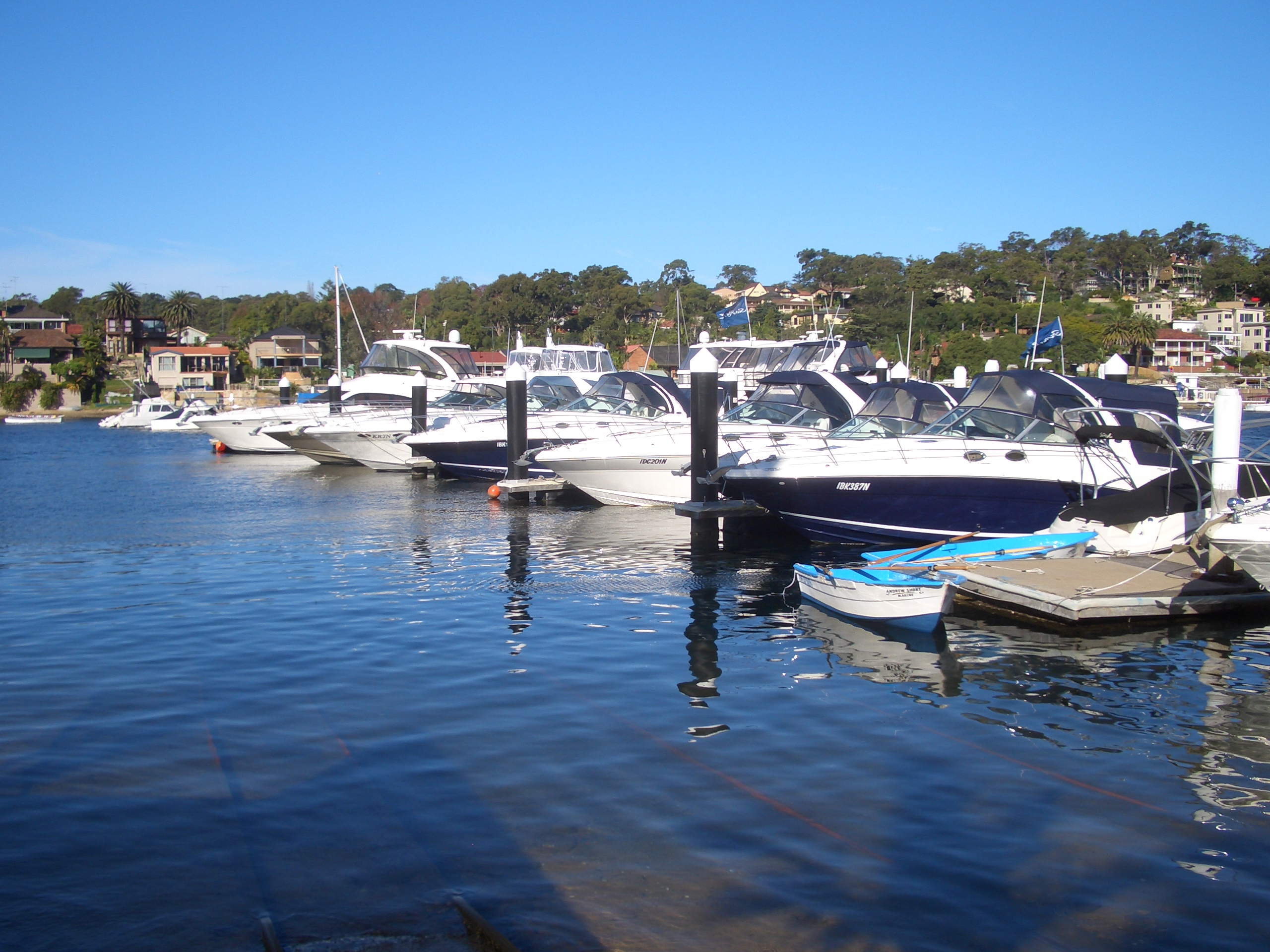 Yowie Bay Marina